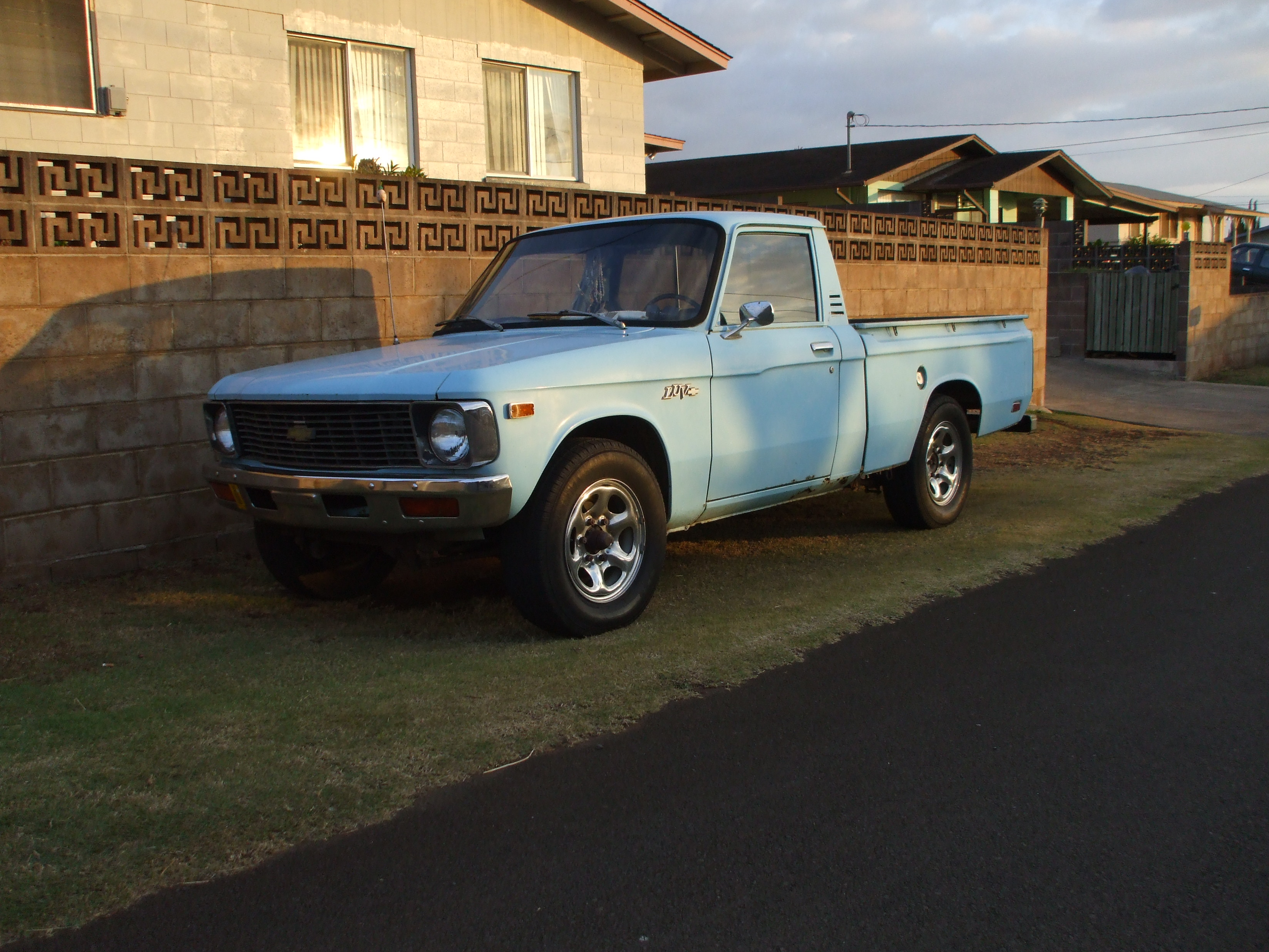 Chevrolet LUV.